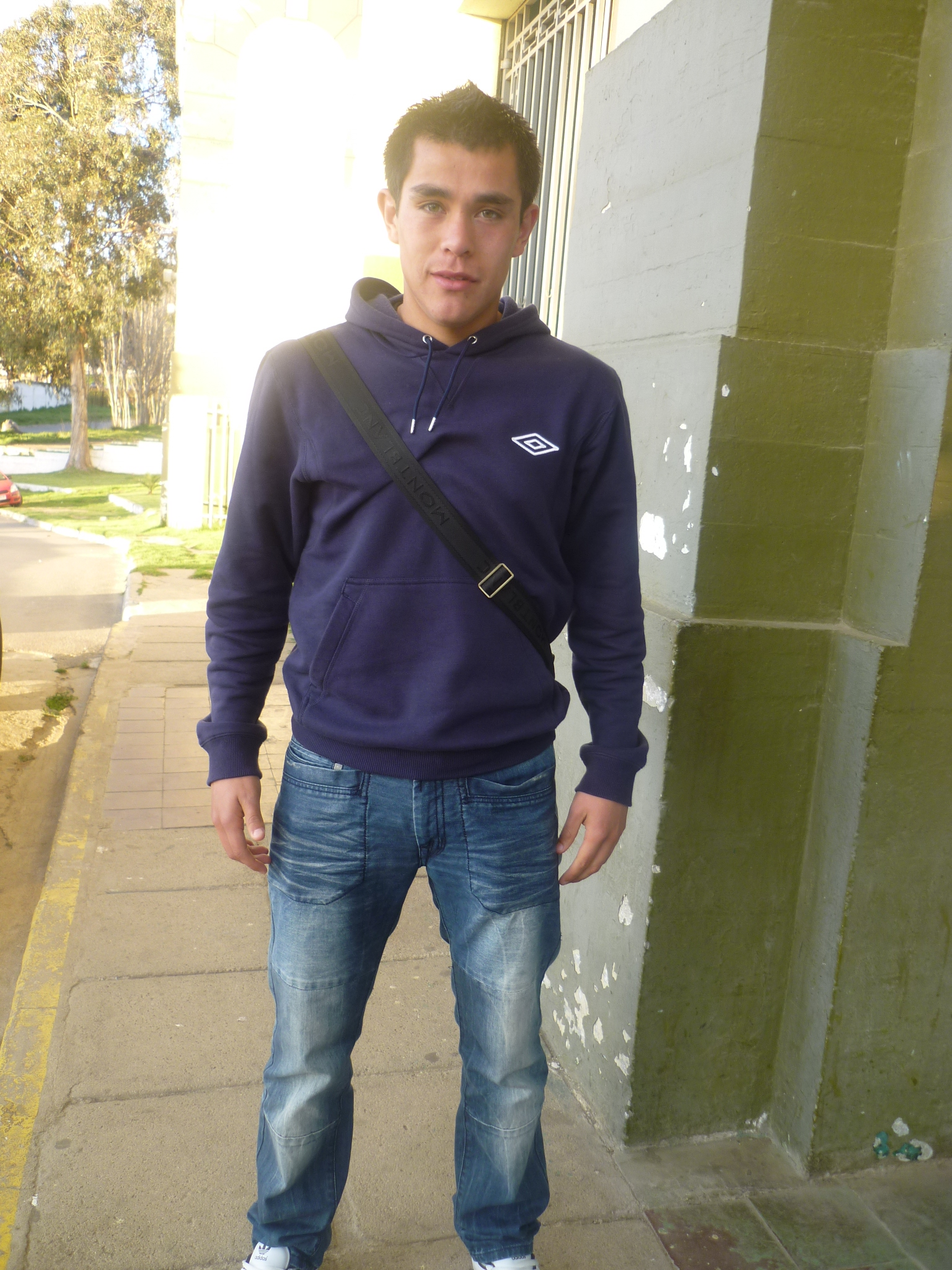 Fotografía de Carlos Muñoz Rojas, jugador de Colo-Colo, Uno de los mejores.